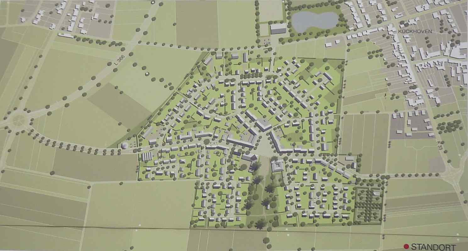 Planung Neu-Immerath (Erkelenz) bei Kückhoven Quelle: öffentliche Schautafel im Baugebiet